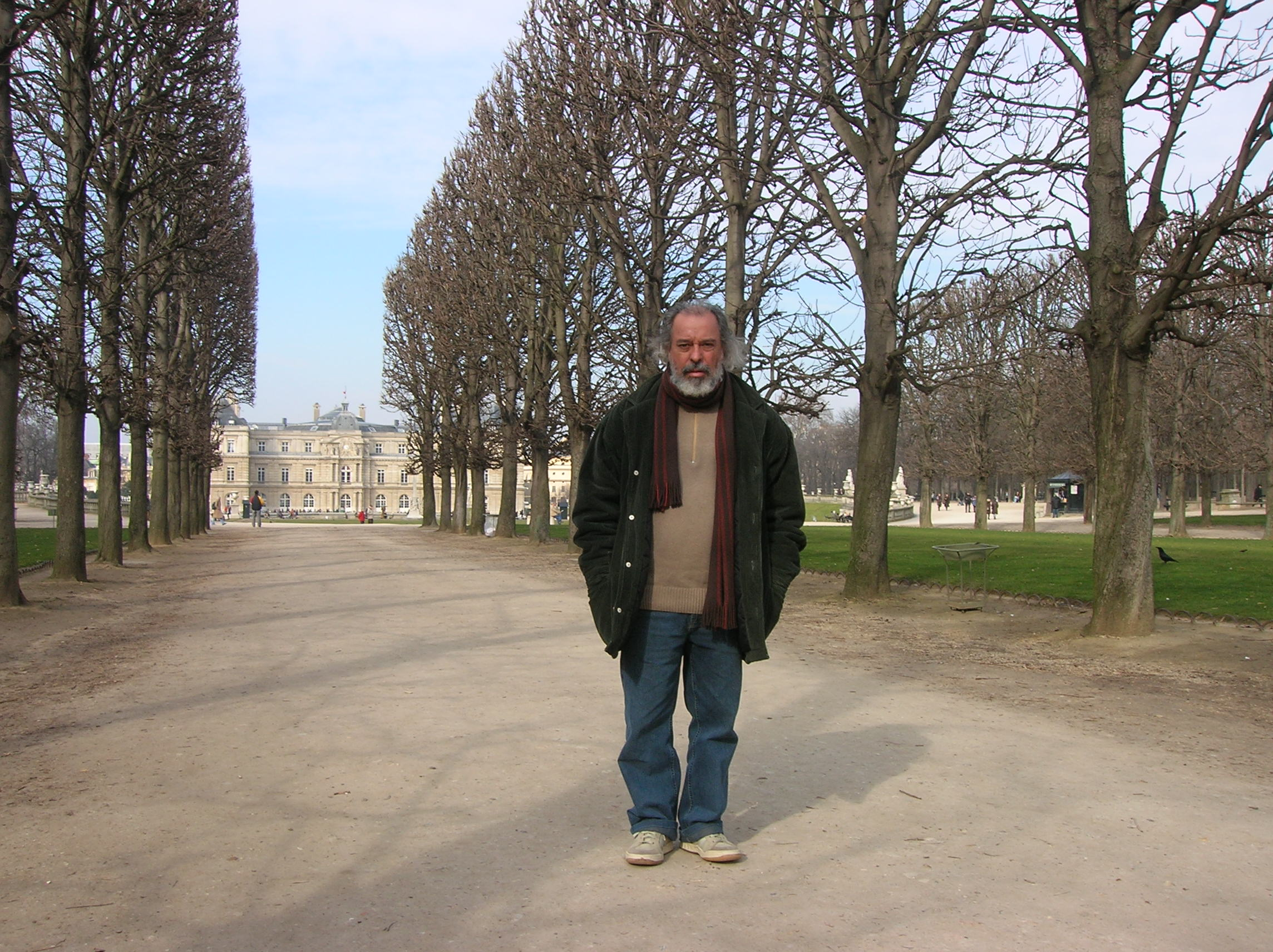 O poeta brasileiro Carlos Lima é autor de vários livros e também é professor da UERJ. Nesta foto, ele está no Jardim de Luxemburgo, Paris.